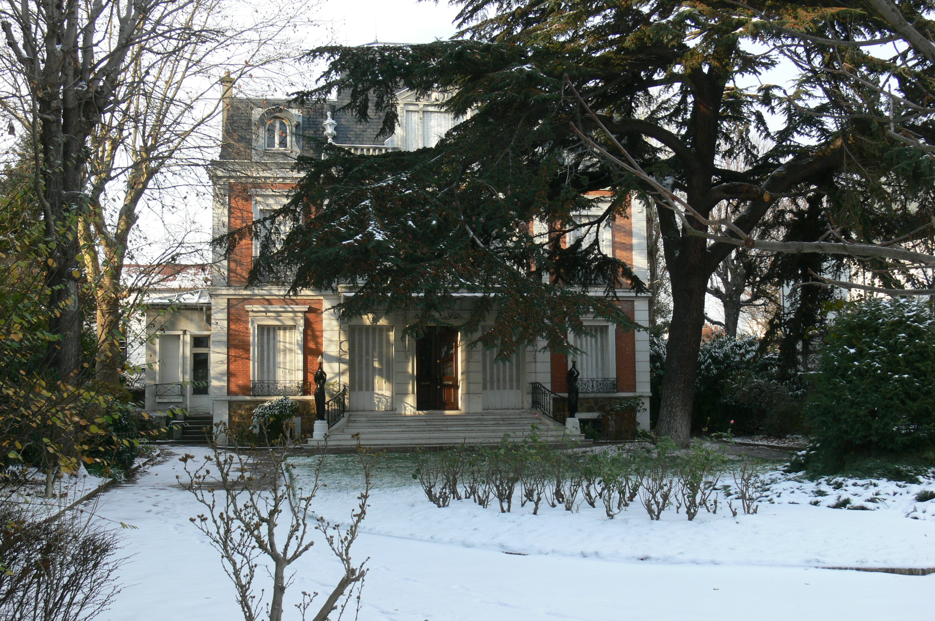 Villa des roses de face